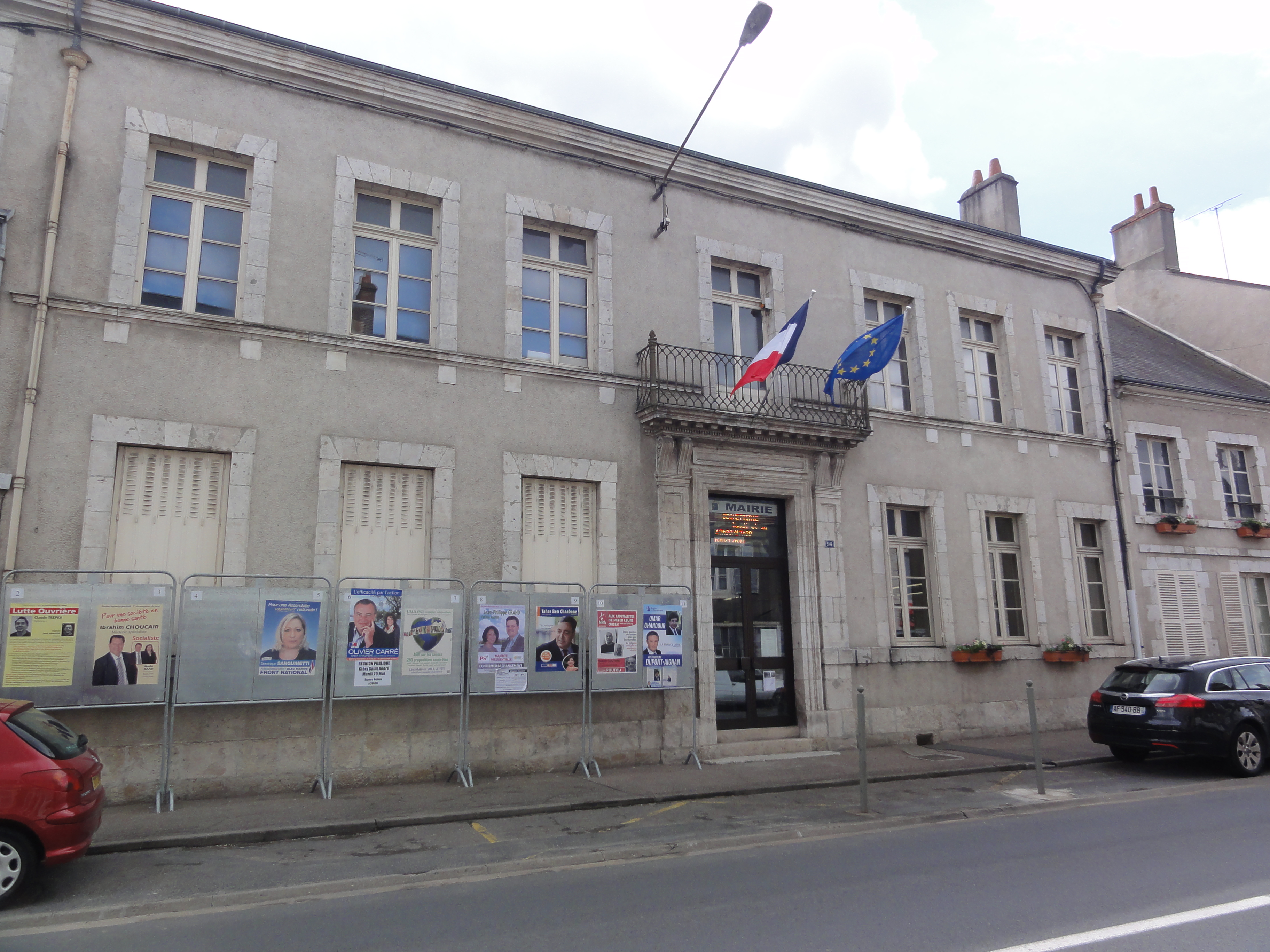 Cléry-Saint-André Mairie (à Cléry)